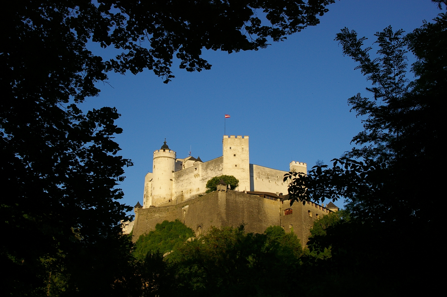 Festung Salzburg.